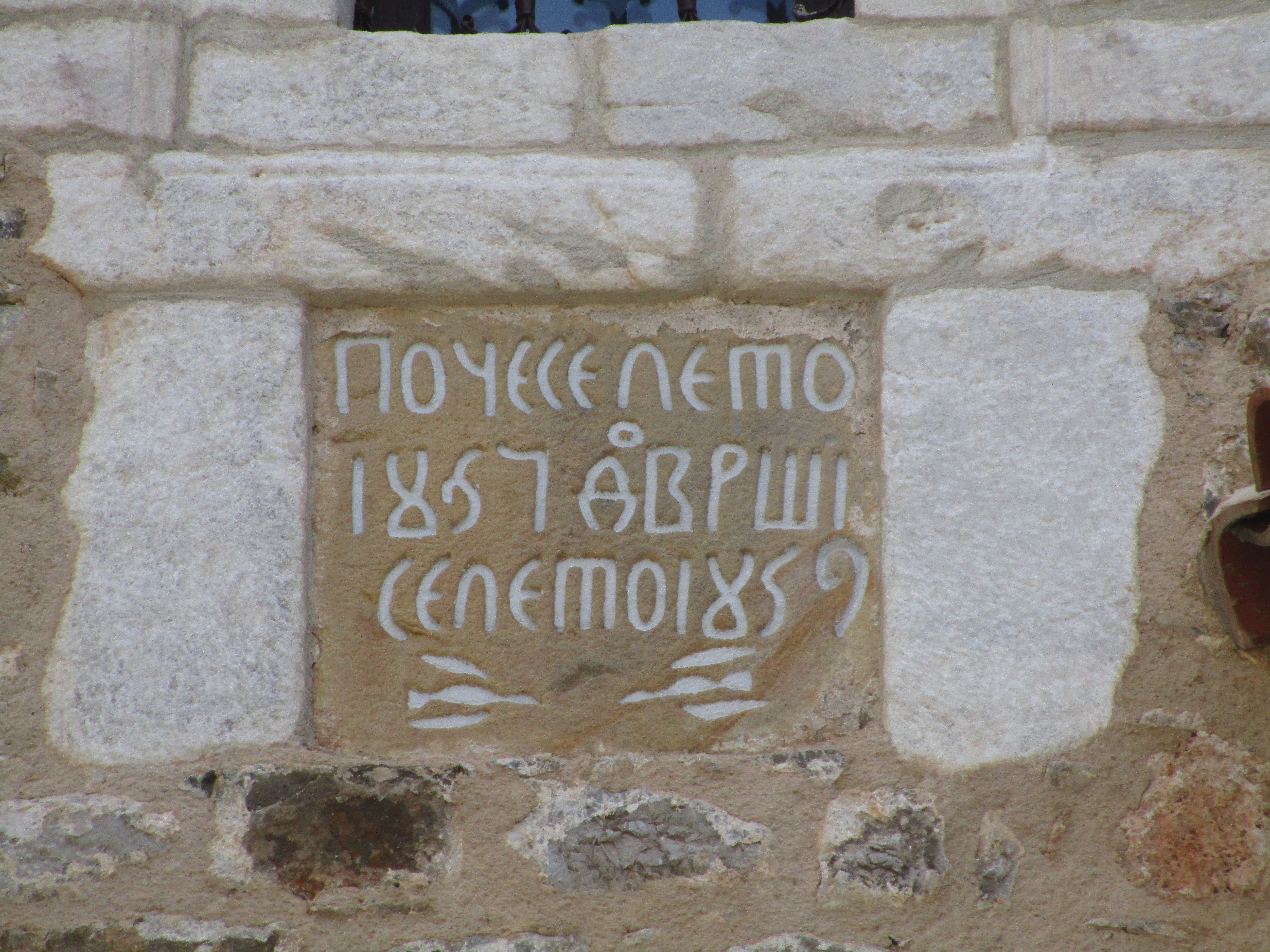 Српски (ћирилица): Манастир Суково